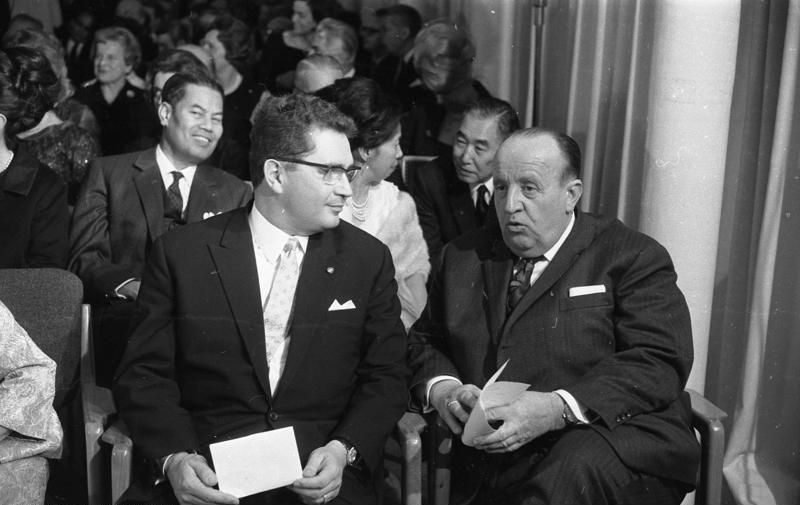 Bundespräsident Lübke u. Mitglieder des Dipl. Corps in der Landesvertretung Bayern